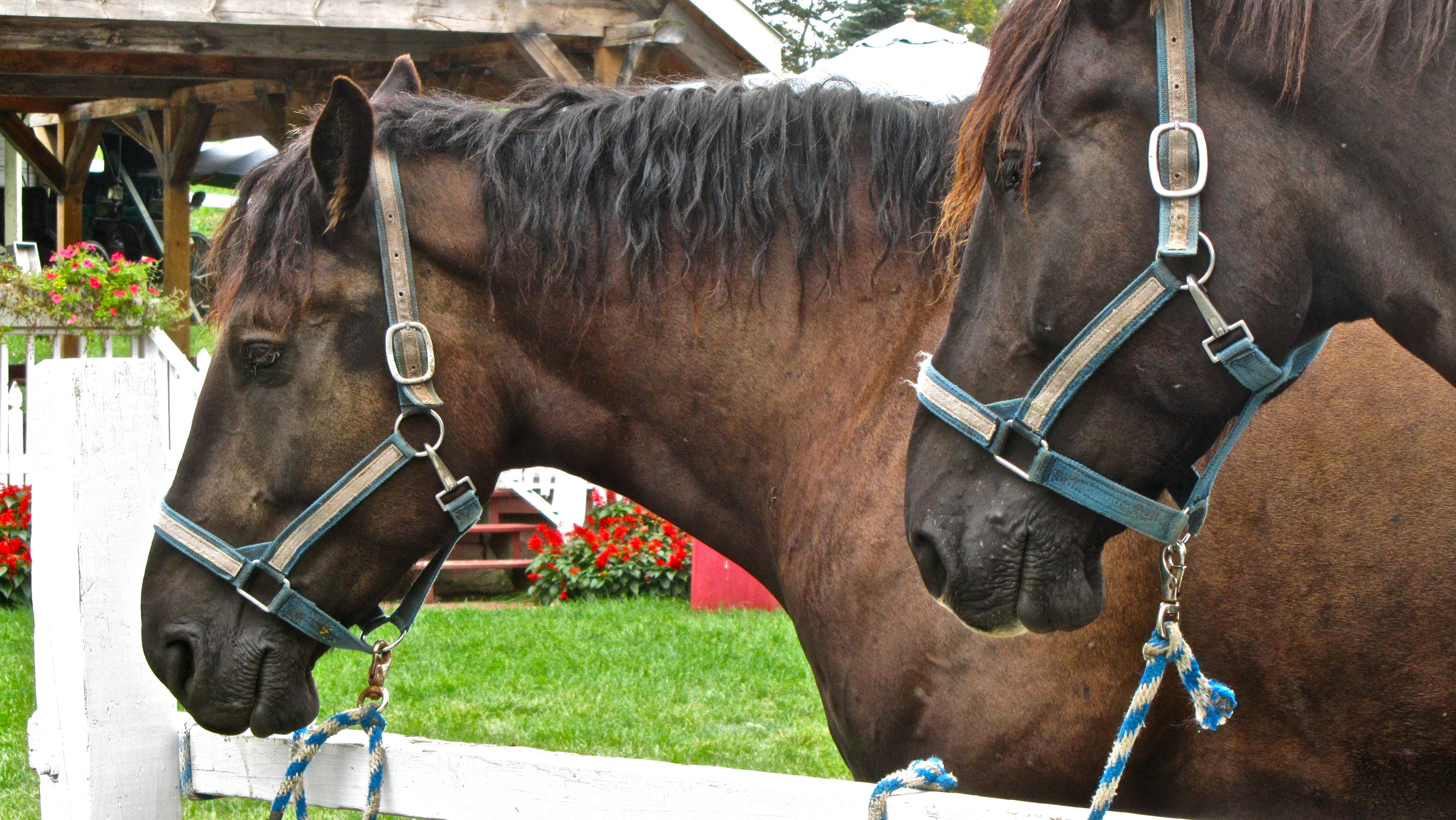 Percheron